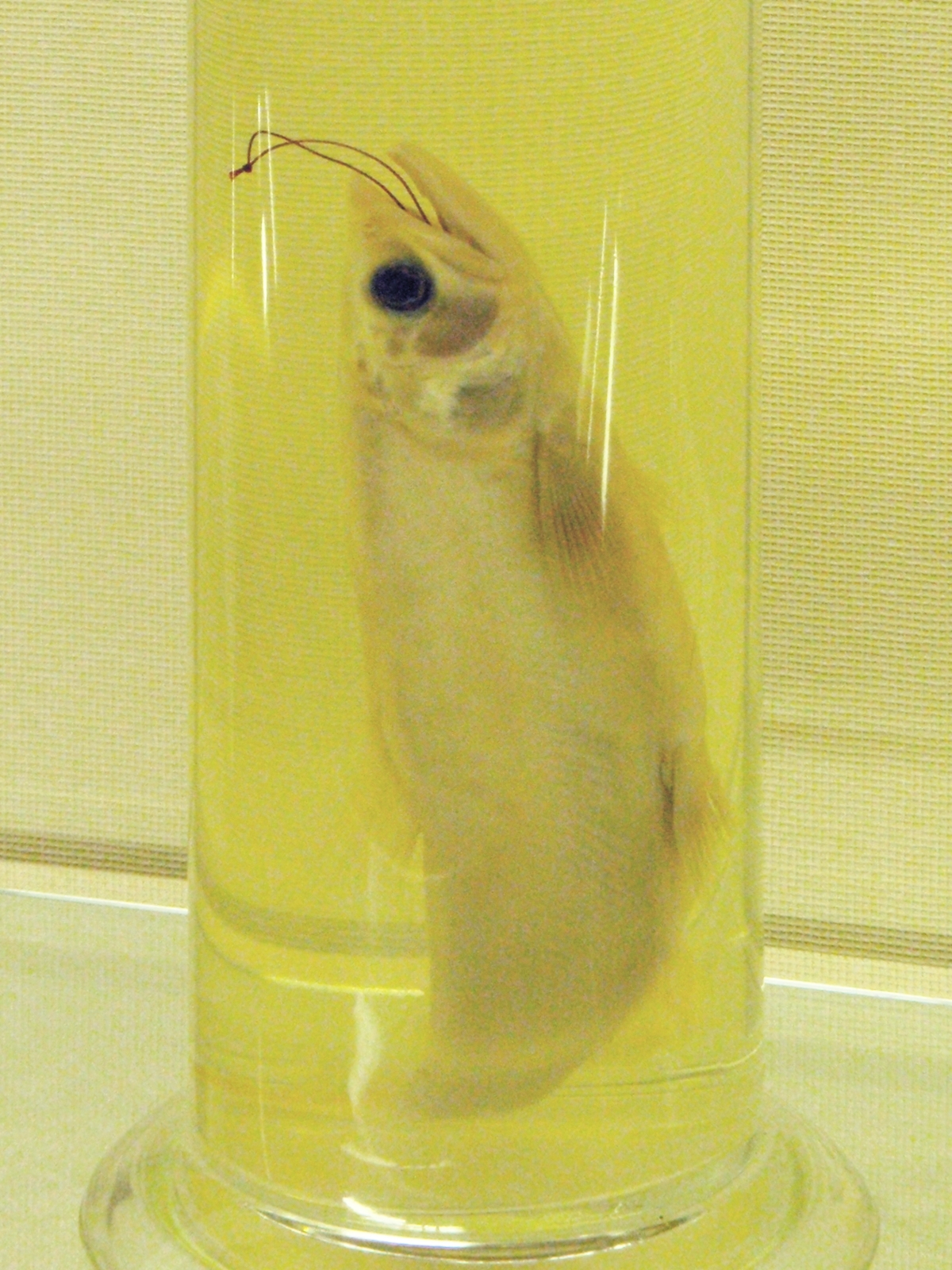 仙北市田沢湖郷土史料館に展示されているクニマス標本の一つ。